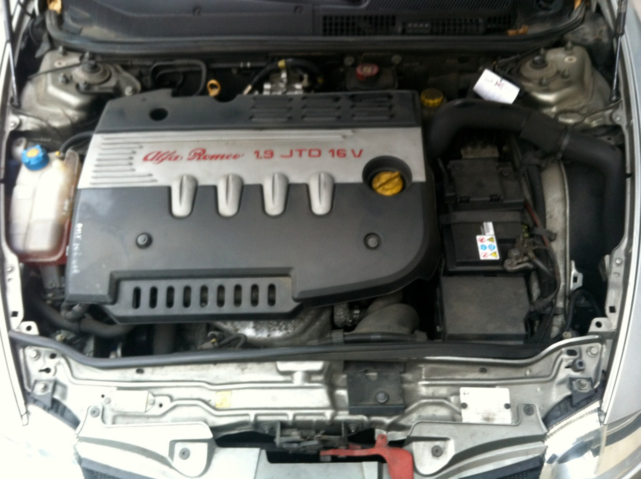 Motore Alfa Romeo JTD (1.9) su Alfa Romeo GT